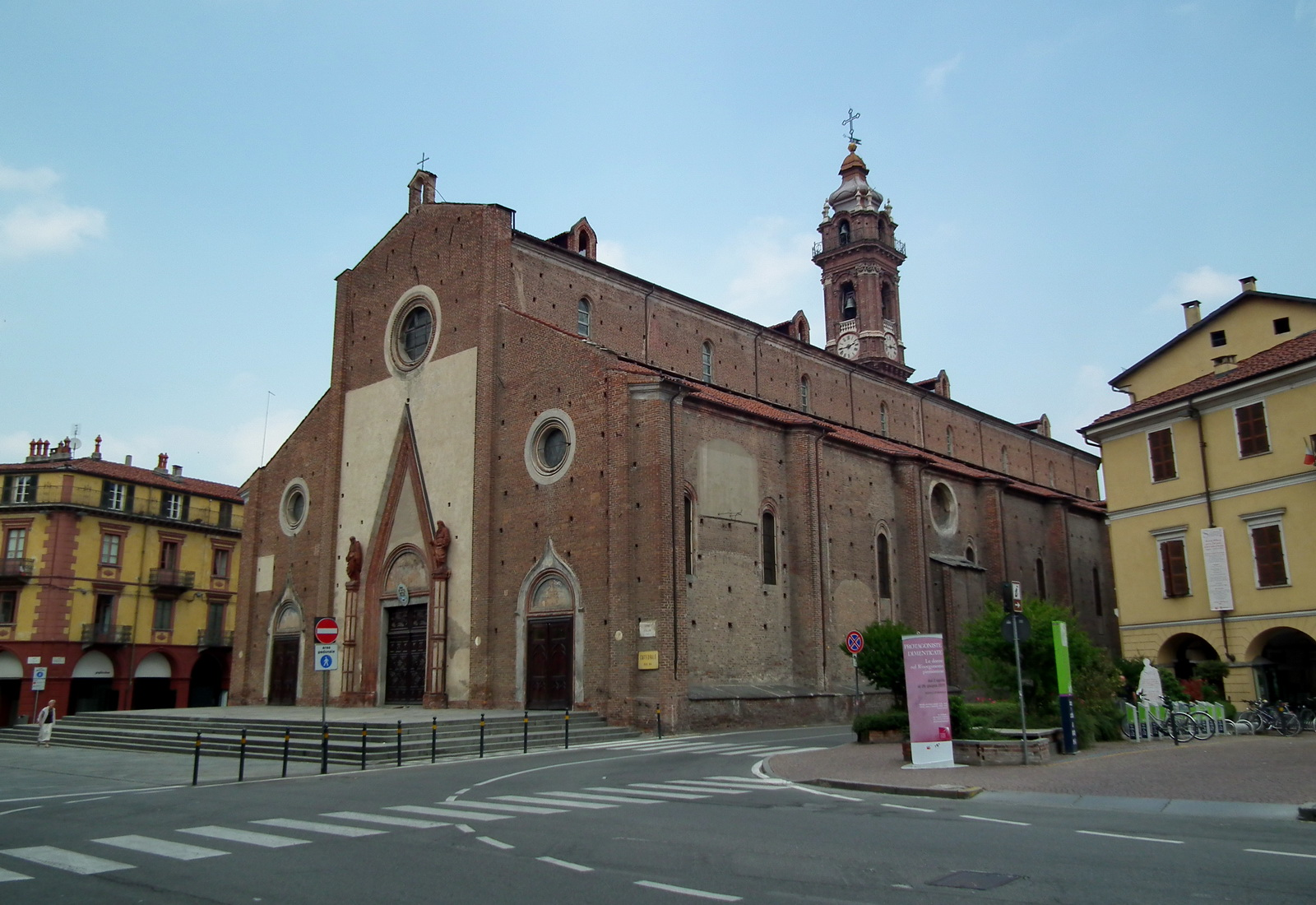 Duomo di Saluzzo Native nameDuomo di SaluzzoLocationSaluzzo, Piedmont, ItalyCoordinates44° 38′ 40.56″ N, 7° 29′ 33.72″ E Established1491 Web page Authority control : Q2942780 VIAF: 123620076 LCCN: nr98023956 WorldCat institution QS:P195,Q2942780